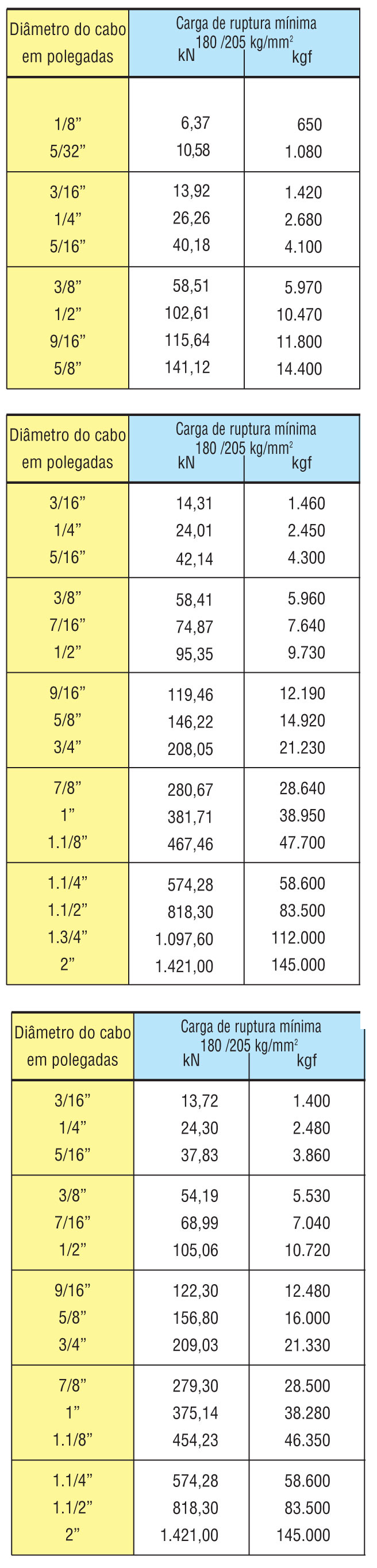 Tabela de Resistência